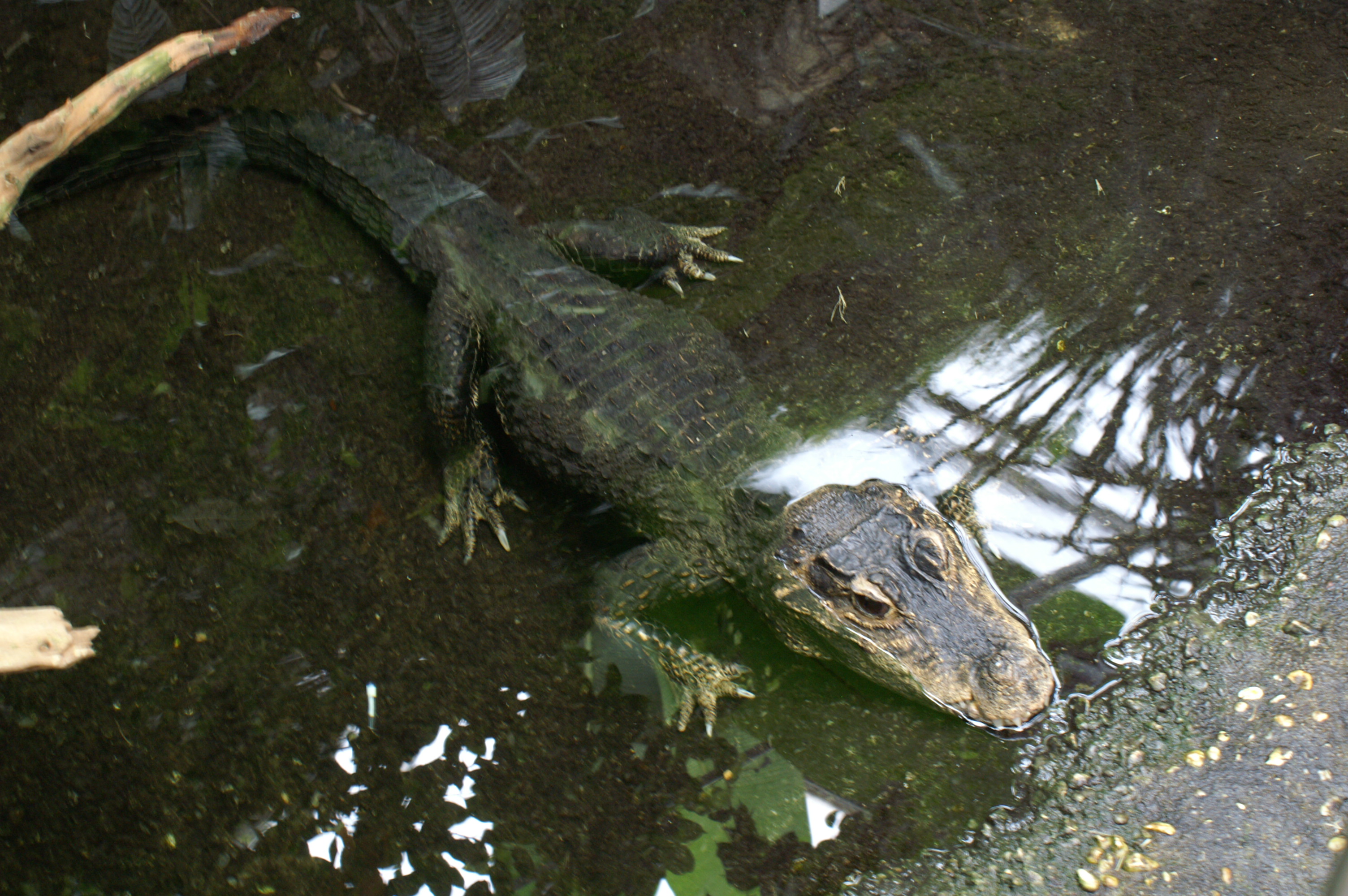 Stumpfkrokodil im Tierpark Dählhölzli Bern